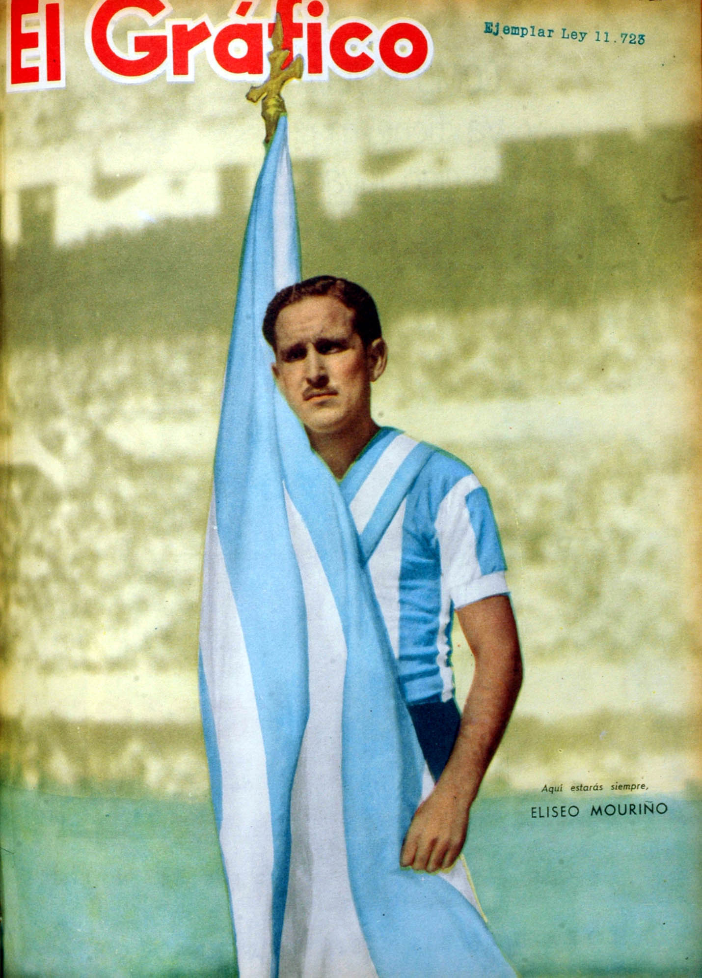 El Grafico del 26 de Abril de 1961. Edicion 2169